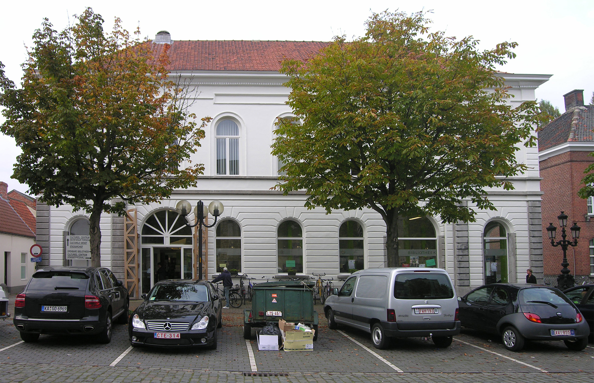 Stadsbibliotheek en cultureel centrum Lokeren